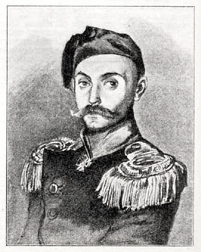 Данное изображение было использовано в статье «Безобразов, Сергей Дмитриевич» опубликованной в четвёртом томе «Военной энциклопедии», который был издан книгоиздательским товариществом Ивана Дмитриевича Сытина в 1911 году в столице Российской империи городе Санкт-Петербурге.